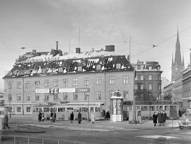 "Kronprinsens stall" vid Tegelbacken i Stockholm 1950 (numera riven)